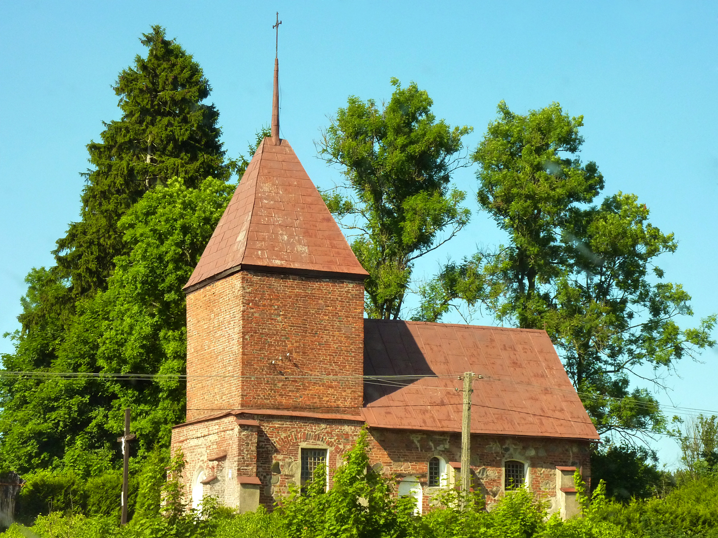 Sierakowo Sławieńskie - kościół p.w. MB Różańcowej (zabytek nr rejestr. 405)